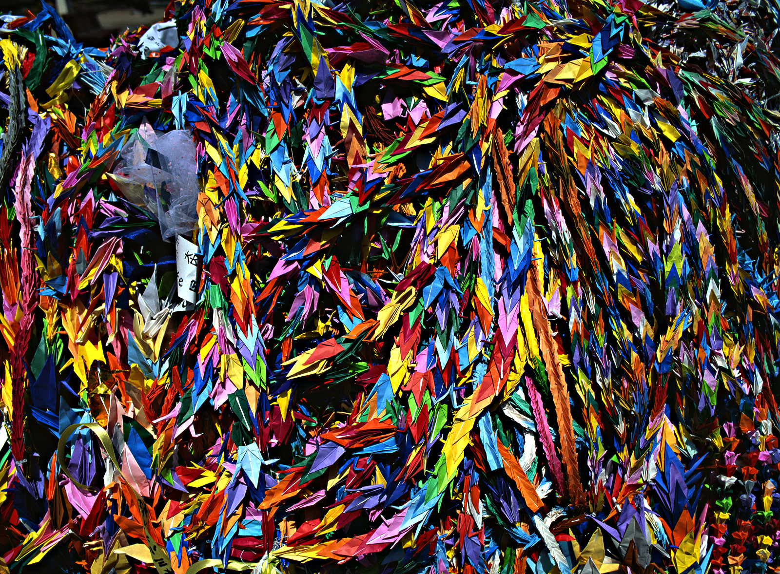 Zelfgemaakte media (gescande 6x7 dia)